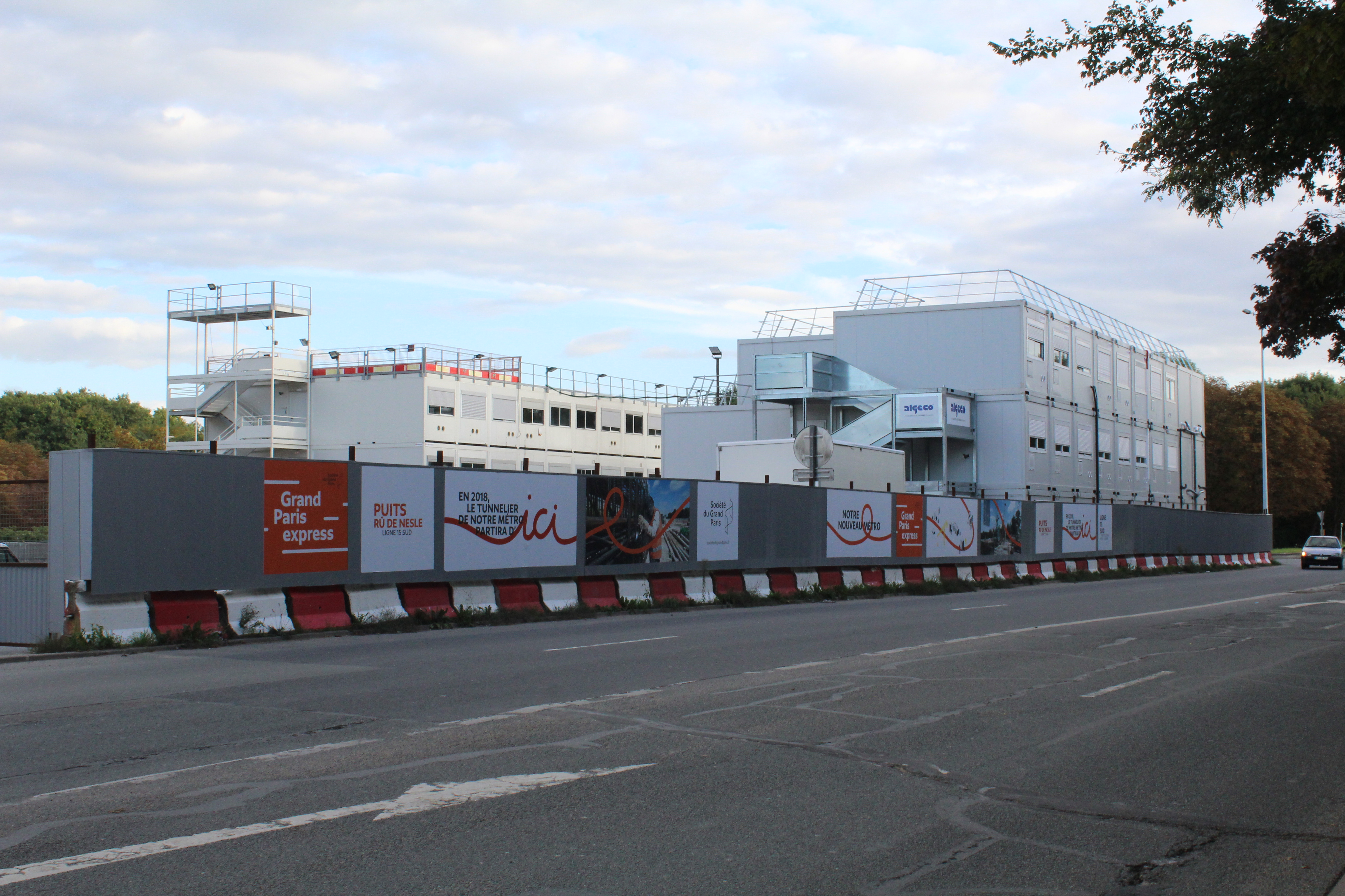 Chantier au Puits Rû de Nesle pour la ligne 15 du métro de Paris, Noisy-le-Grand.